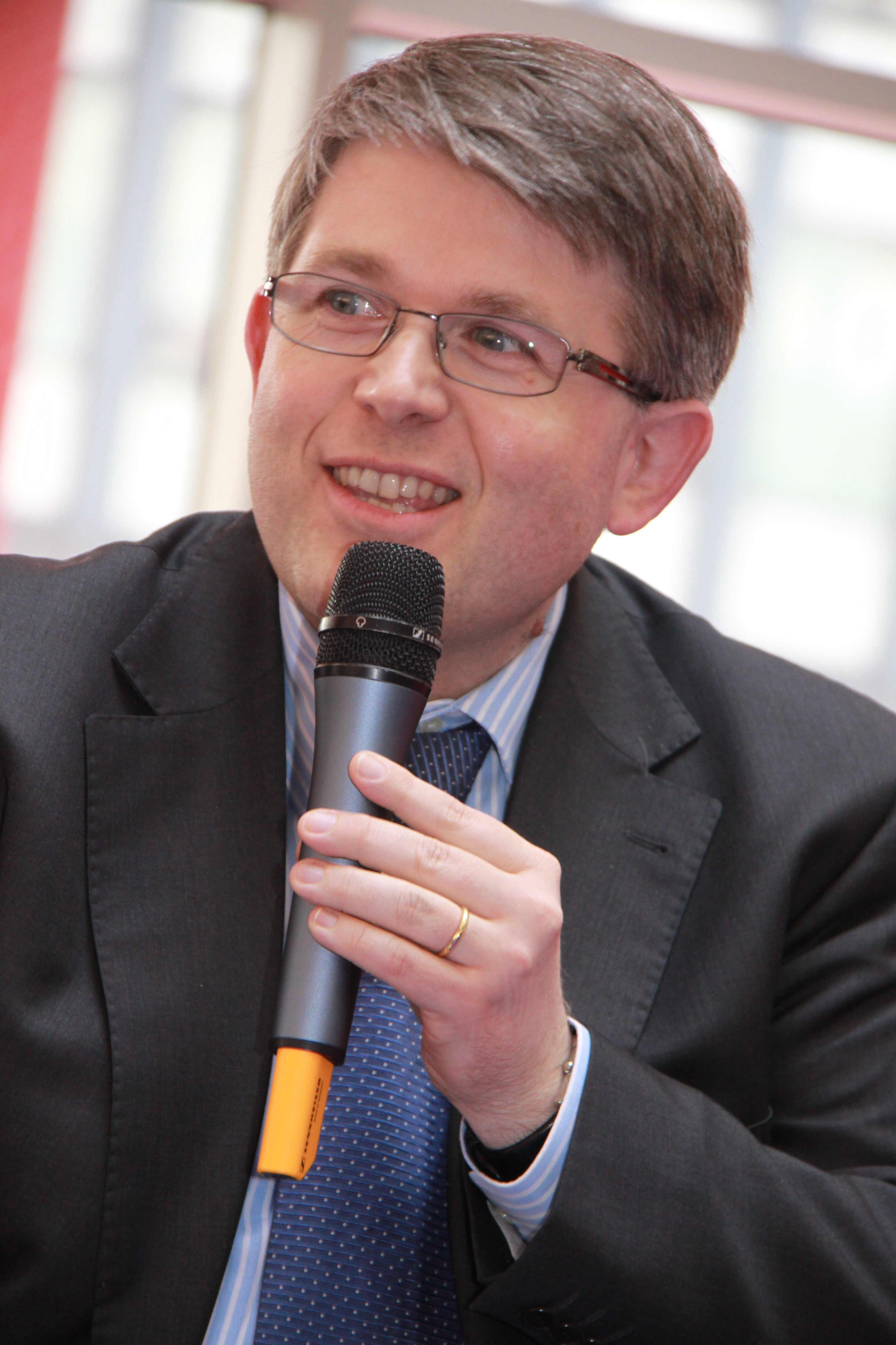 Portrait de Patrick Hetzel, Directeur général pour l'enseignement supérieur et l'insertion professionnelle